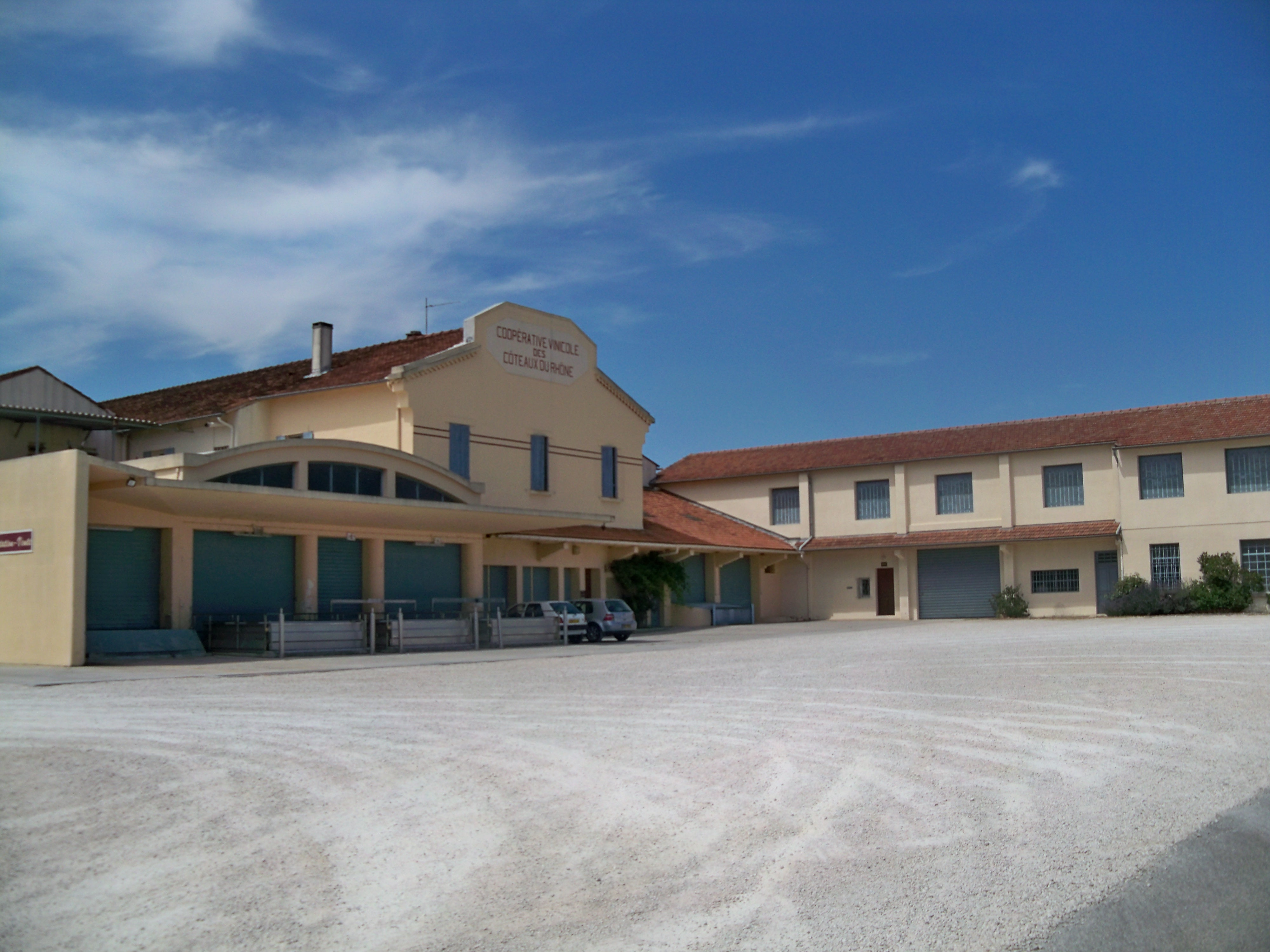 Cave Coopérative de Sérignan, Vaucluse